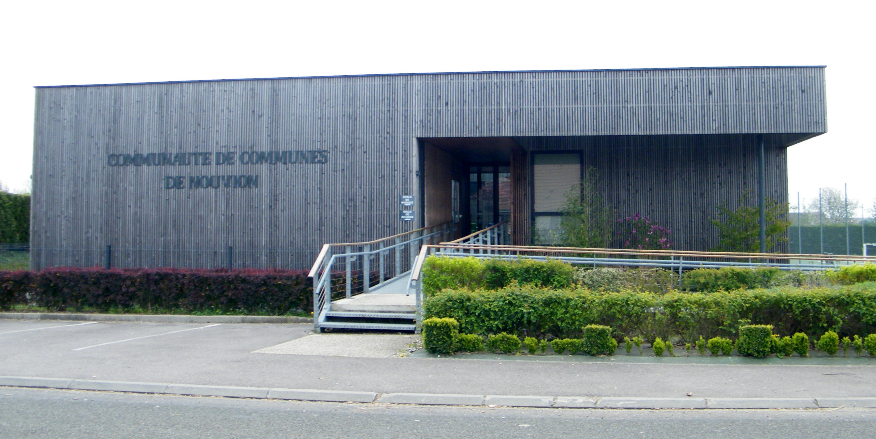 Nouvion, Somme, Fr, siège de l'ancienne Communauté de communes du canton de Nouvion.